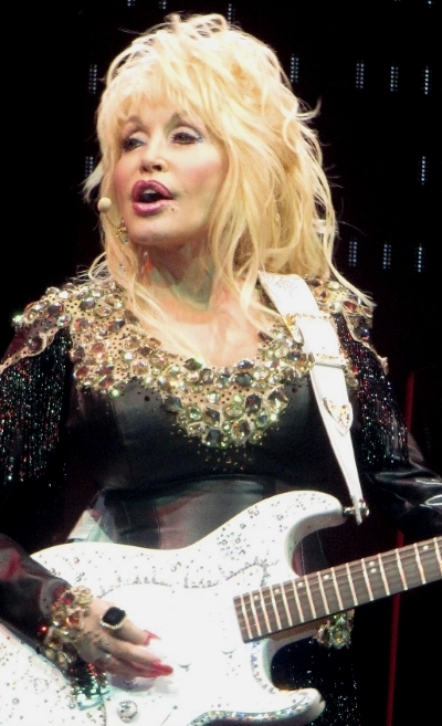 Dolly Parton in Köln in der Lanxess-Arena am 5. Juli 2014